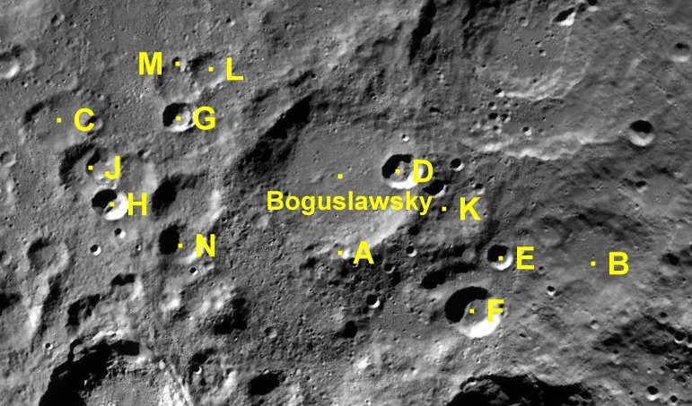 Cráter lunar Boguslawsky. Cráteres satélite. (Imagen LRO)